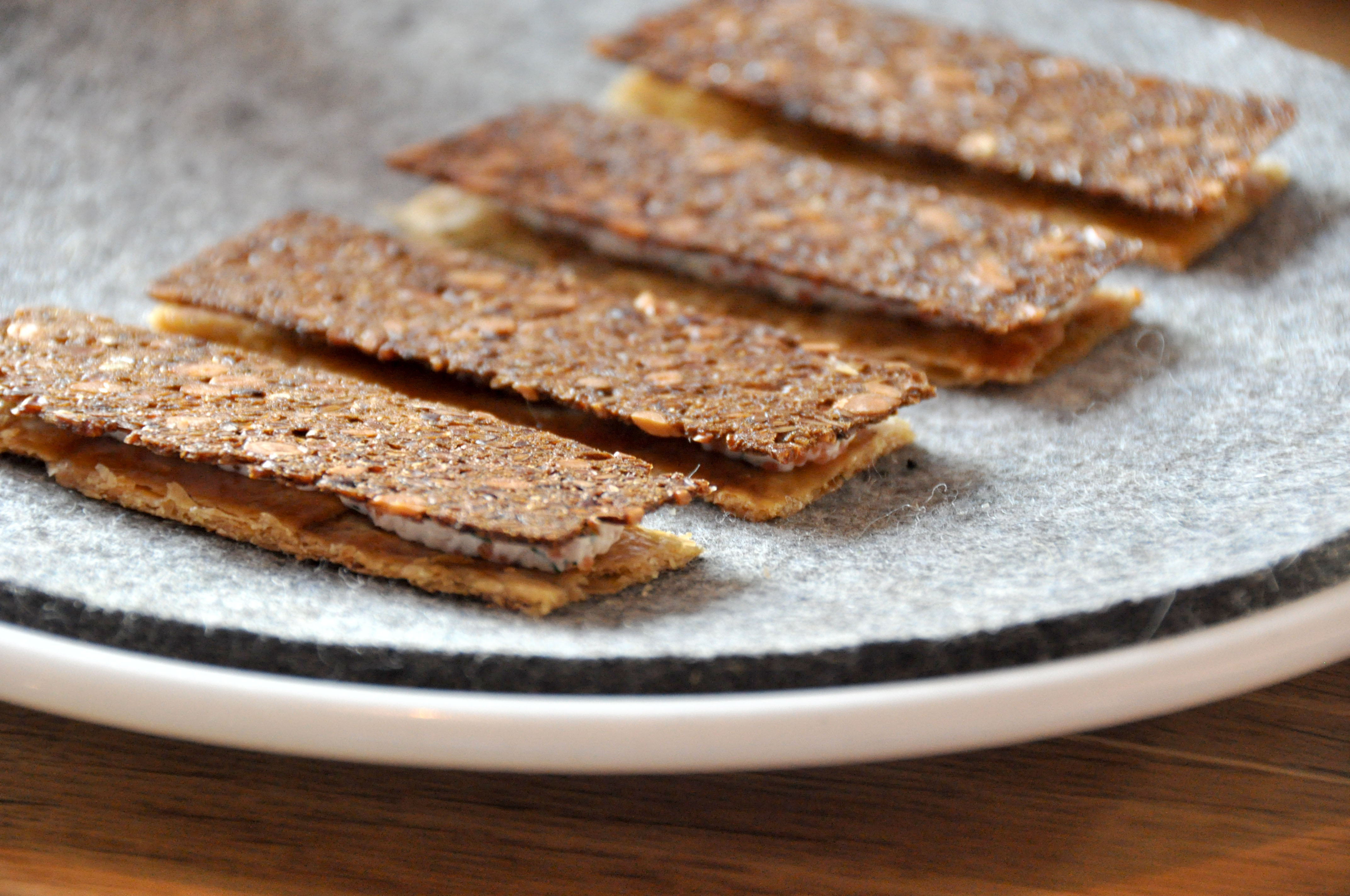 Rugbrød og kyllingeskind med rygeost og stenbiderrogn